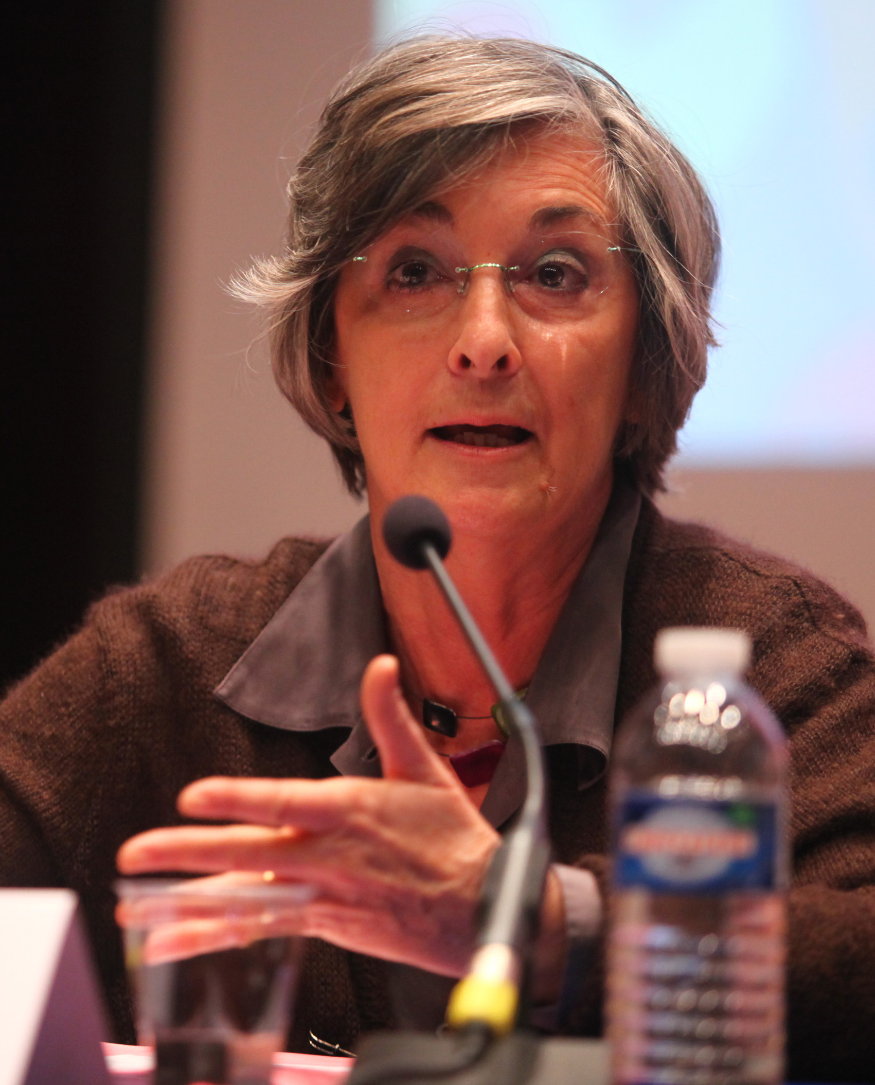 Marie-Françoise Bechtel le 6 novembre 2010 lors du 1er forum des Think Tanks organisé par la Fondapol.